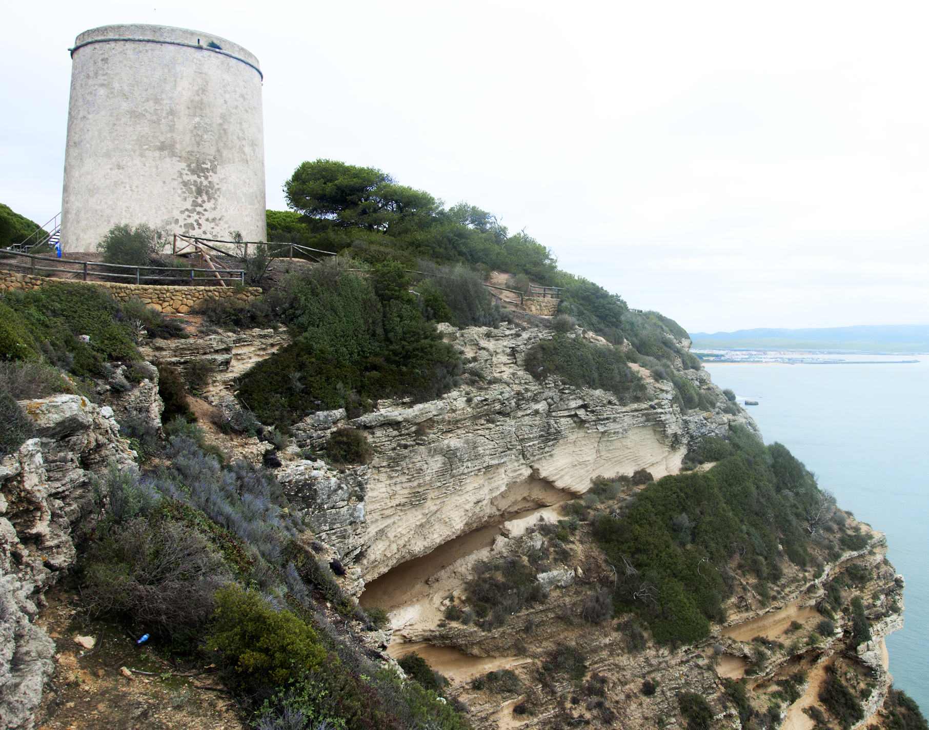 Parque natural de La Breña y Marismas del Barbate This is a photography of a Site of Community Importance in Spain with the ID: ES6120008. Natura2000 entry, EEA entry